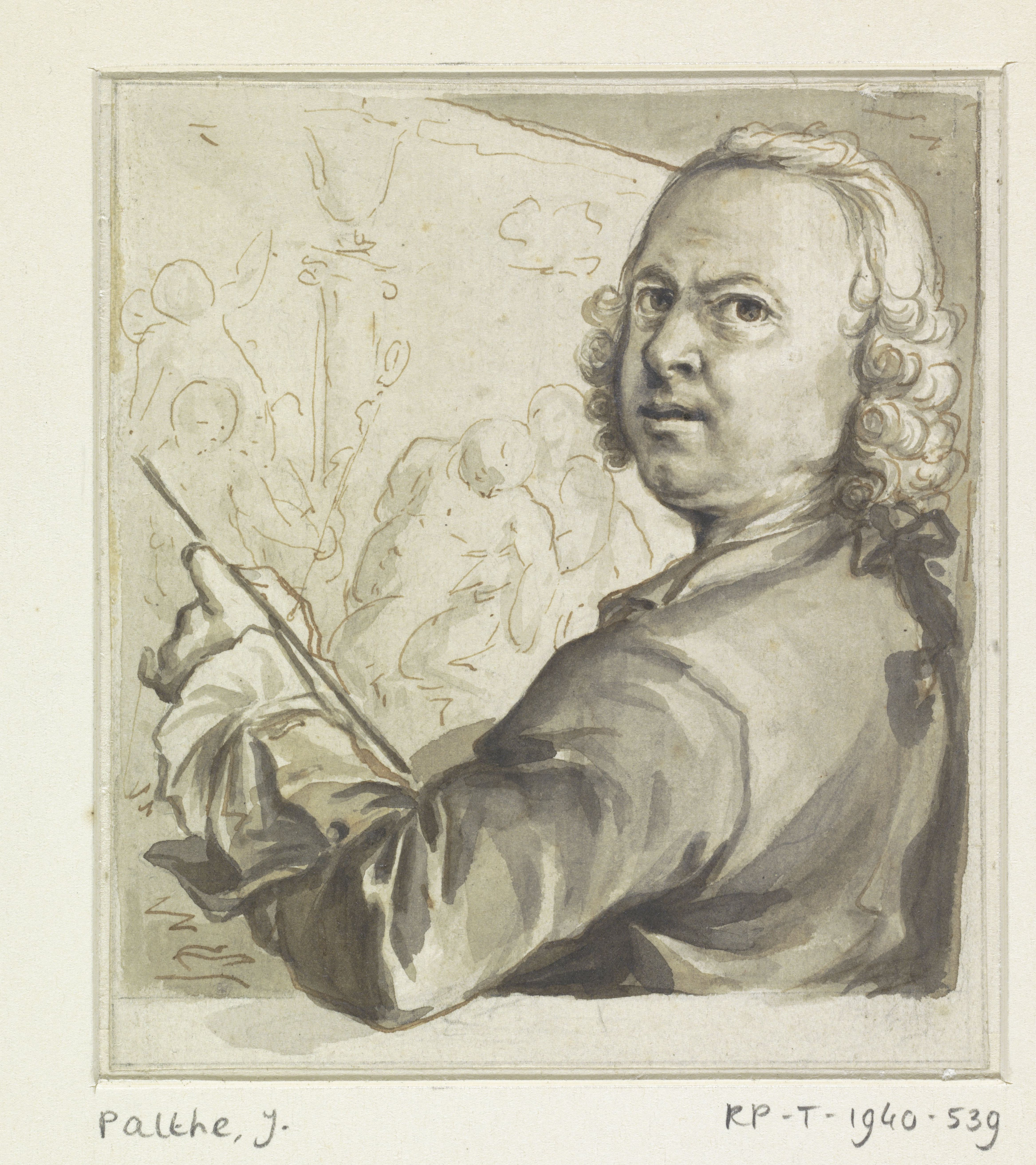 IdentificatieTitel(s): Zelfportret van Jan PaltheObjecttype: tekening Objectnummer: RP-T-1940-539VervaardigingVervaardiger: tekenaar: Jan PaltheDatering: 1729 - 1769Fysieke kenmerken: penseel in grijs en bruin, potlood, pen in bruin, inktMateriaal: papier potlood inkt Techniek: pen / penseelAfmetingen: h 113 mm × b 100 mmOnderwerpWat: portrait, self-portrait of artistportrait, self-portrait of painterpainter at work, in his studiohistorical person (PALTHE, Jan) - historical person (PALTHE, Jan) portrayed aloneWie: Jan PaltheVerwerving en rechtenCredit line: Aankoop uit het F.G. Waller-FondsVerwerving: aankoop 1940Copyright: Publiek domein